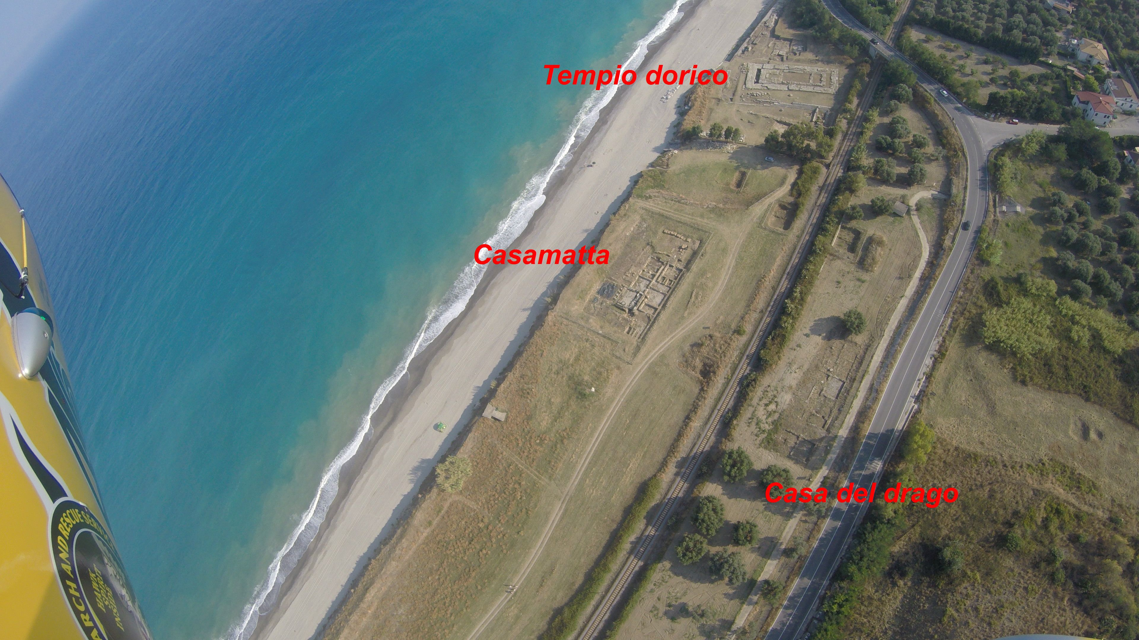 Kaulon vista dall'alto con testo